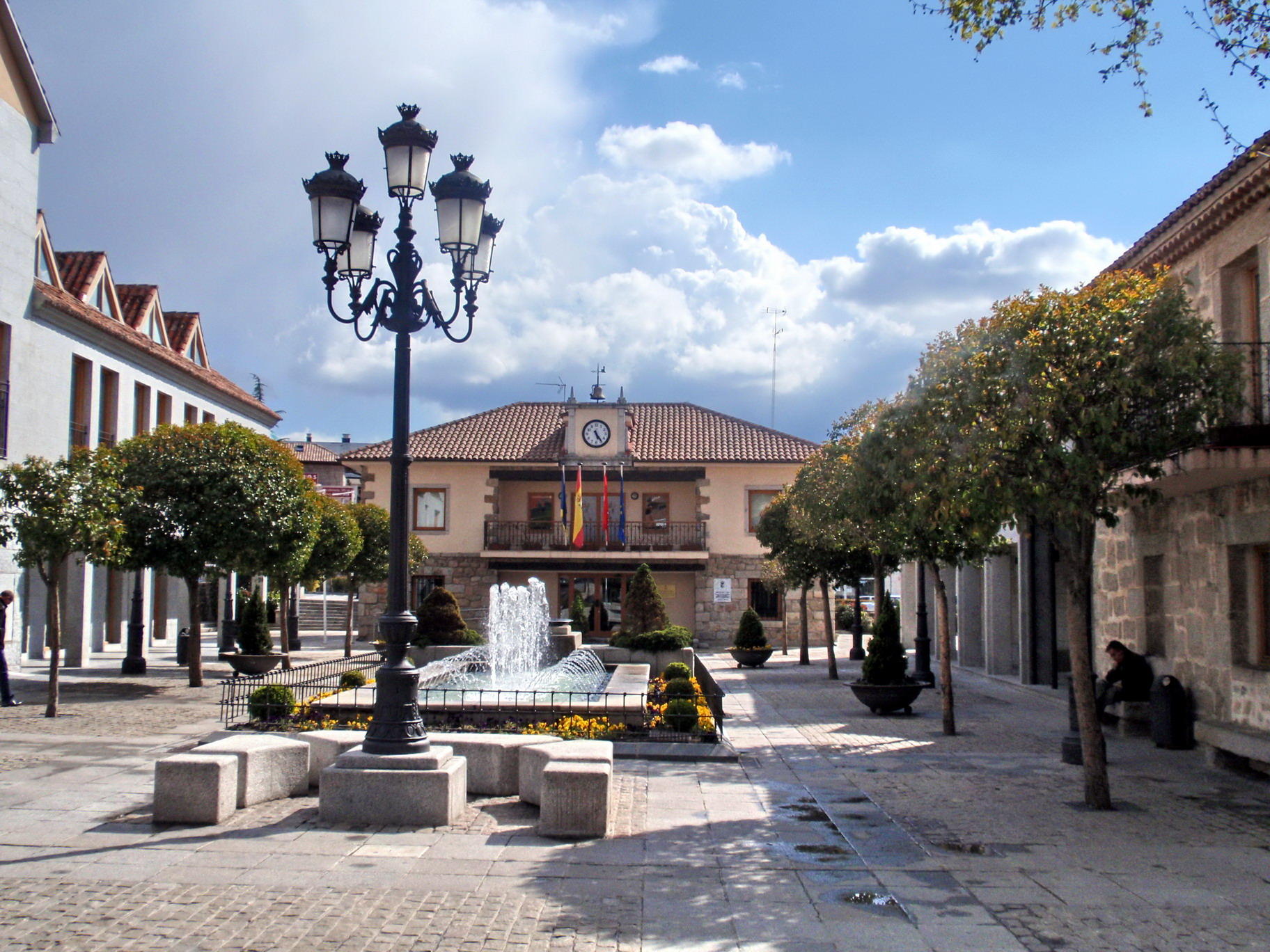 Torrelodones. Plaza de la Constitución con el Ayuntamiento al fondo.